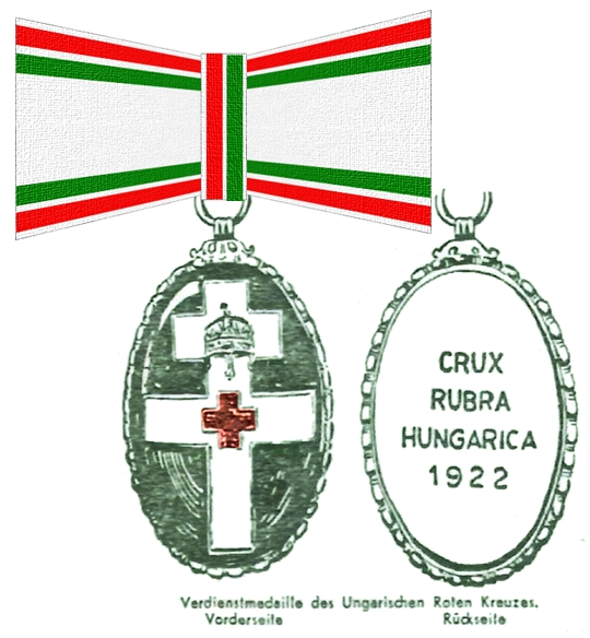 Darstellung der Verdienstmedaille des Ungarischen Roten Kreuzes